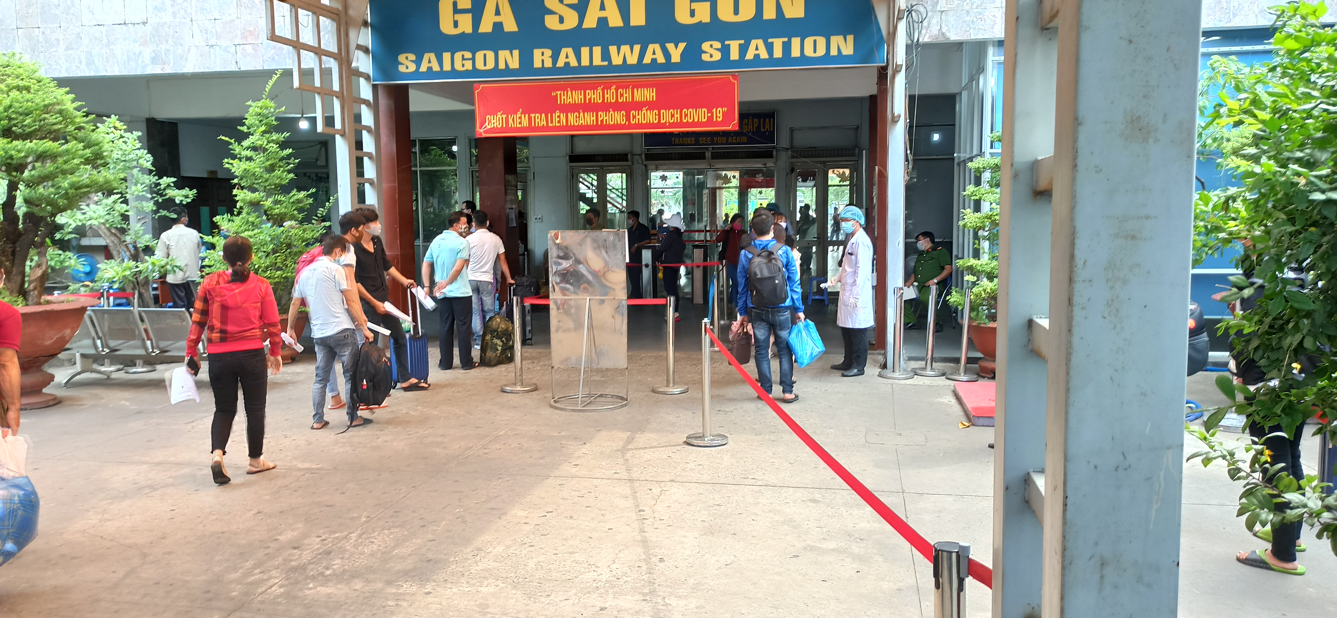 Chốt kiểm dịch y tế ở nhà ga Sài Gòn để phòng ngừa COVID-19